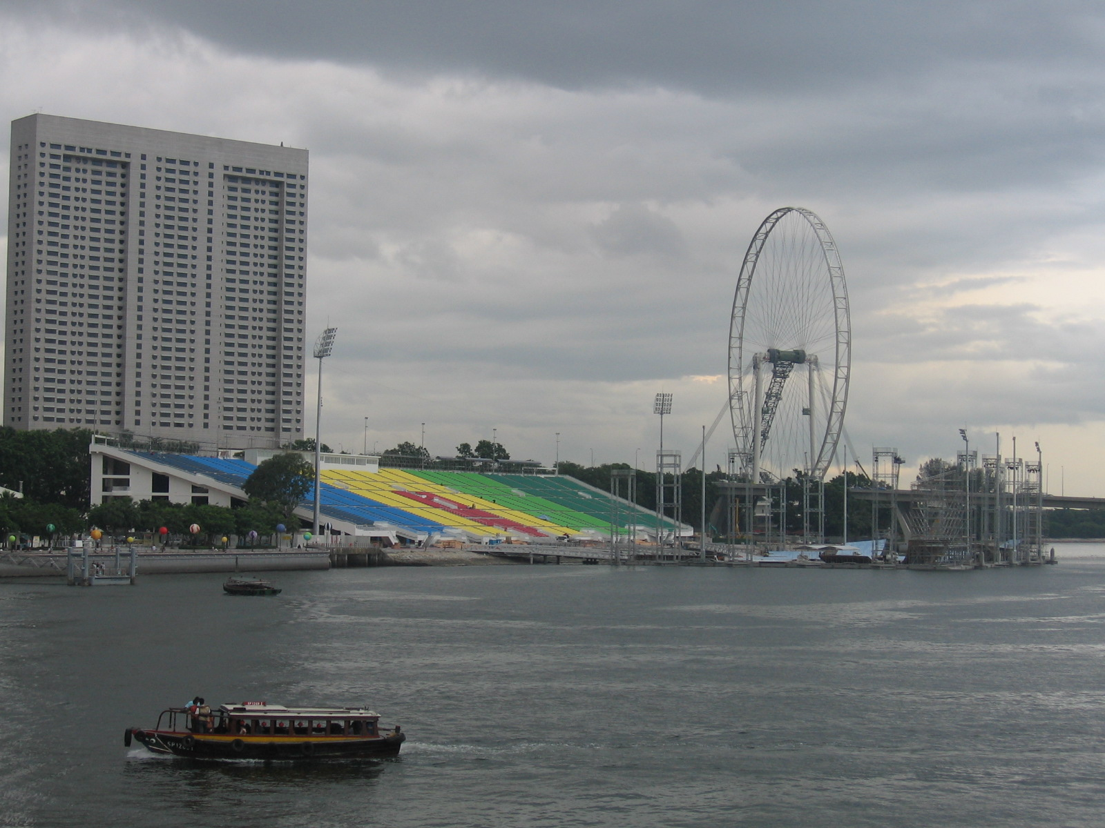 Marina Bay Floating Stadium